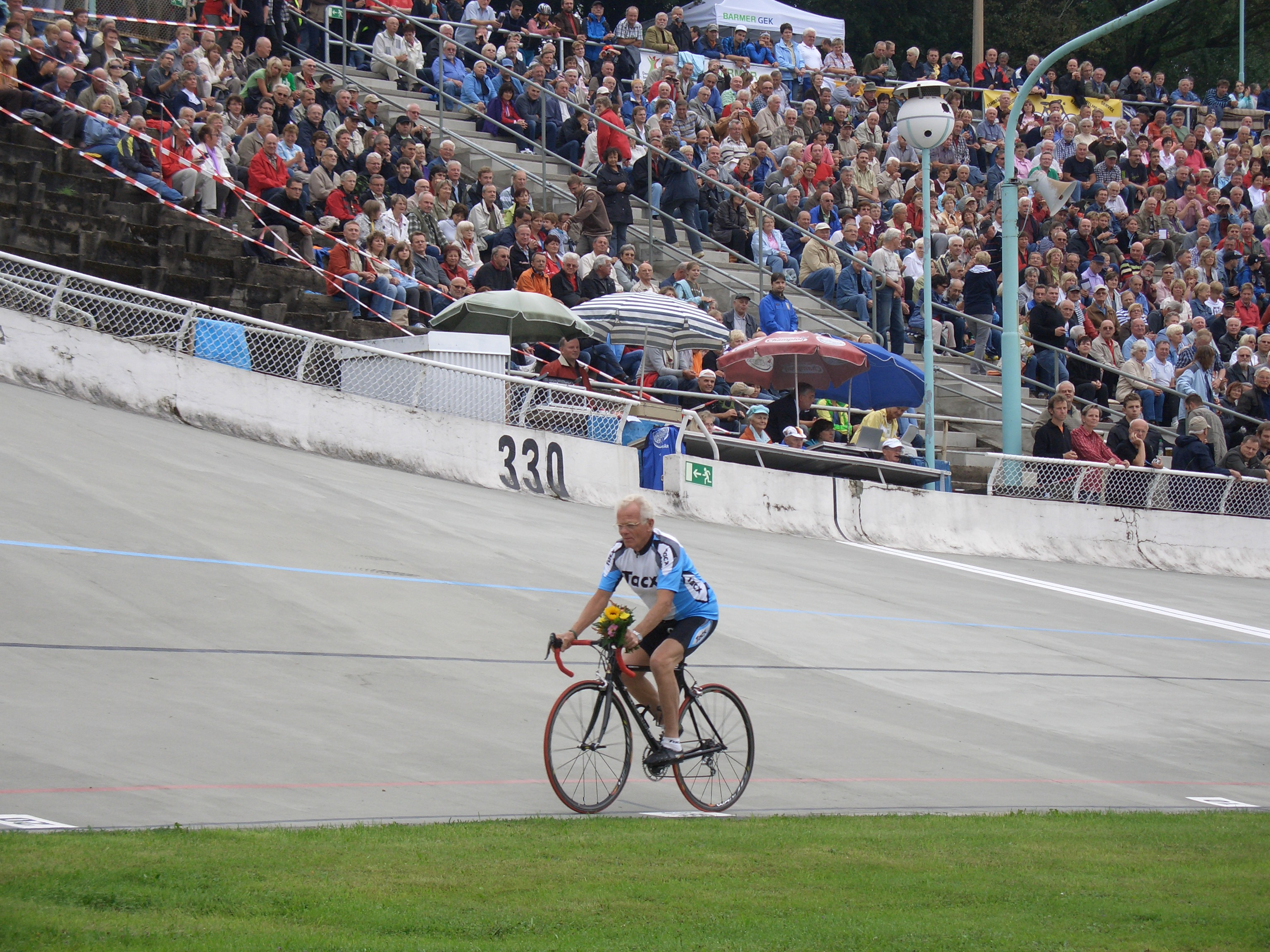 Arie van Houwelingen, niederländischer Radrennfahrer, auf der Radrennbahn Chemnitz anlässlich des 50jährigen Jubiläums der Bahn-WM 1960, wo van Houwelingen Steher-Weltmeister der Amateur wurde.